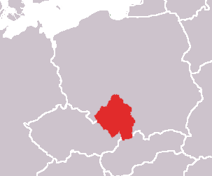 Sujet: Lag vun Uewerschlesien um Gebitt vum haitege Polen an Tschechien Auteur: Jonny84 Source: de-wiki